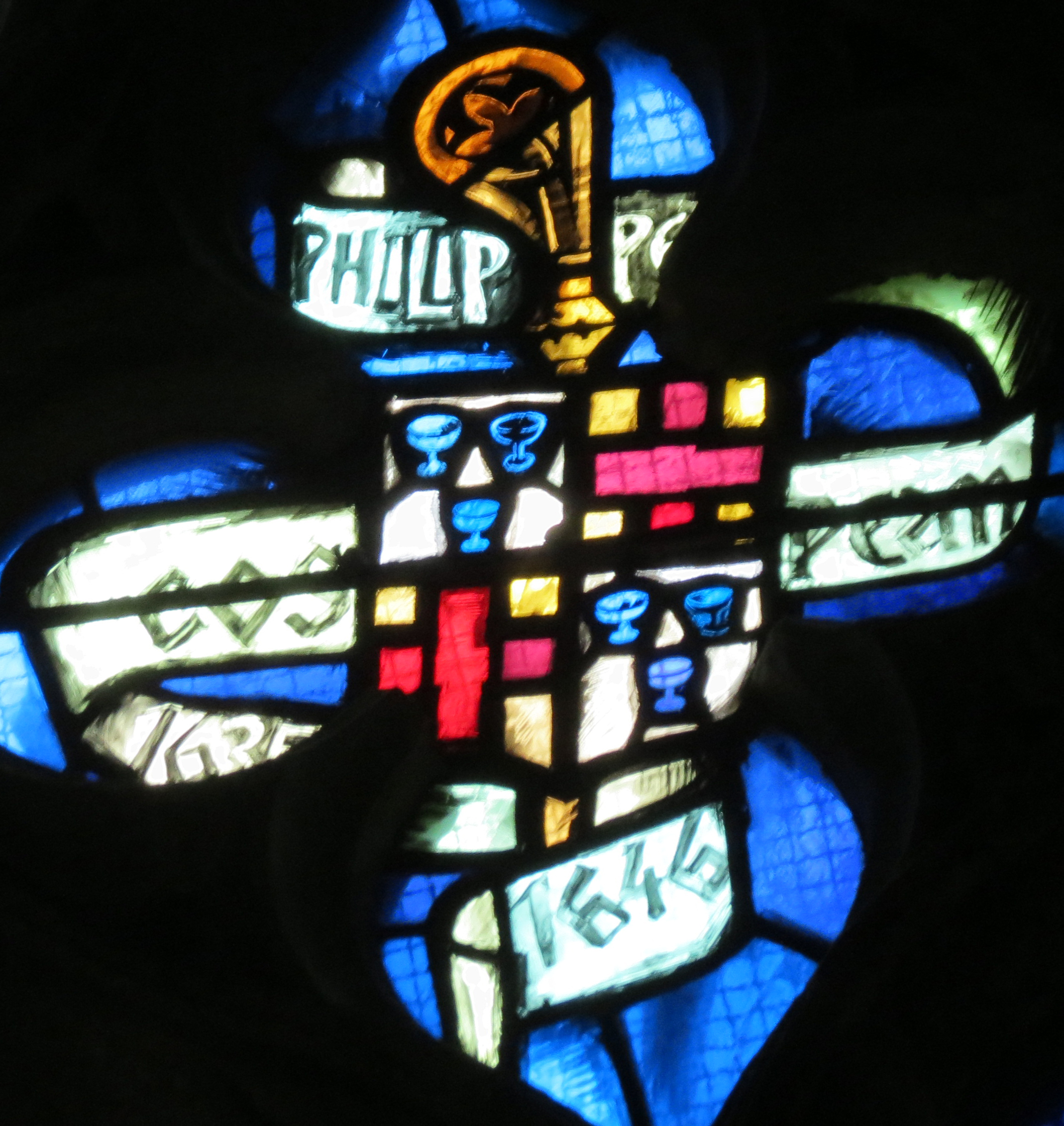 Blason de Philippe Cospéan, évêque de Lisieux (1635-1646).